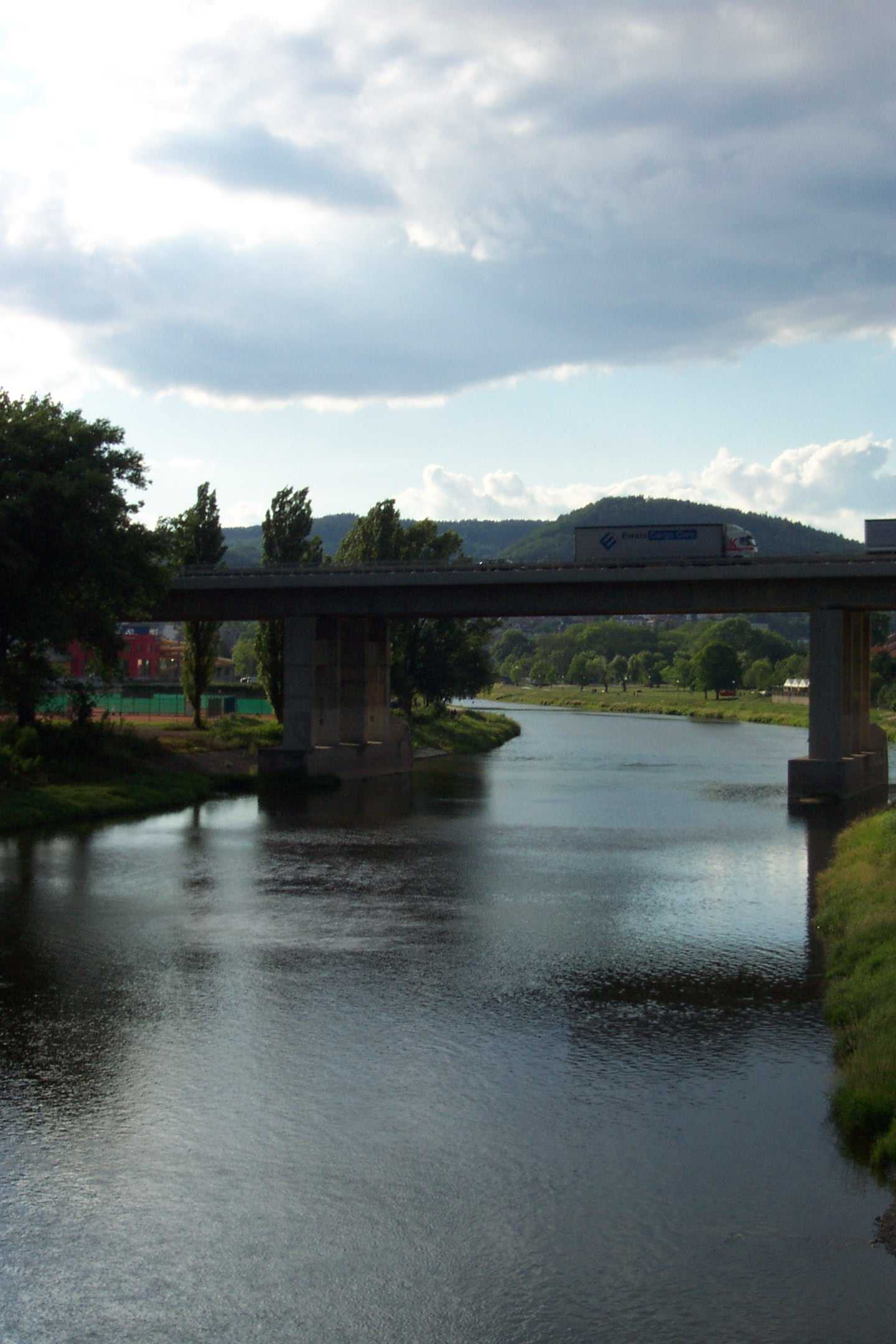 Dálniční most v Berouně - Higway bridge in Beroun over Berounka river